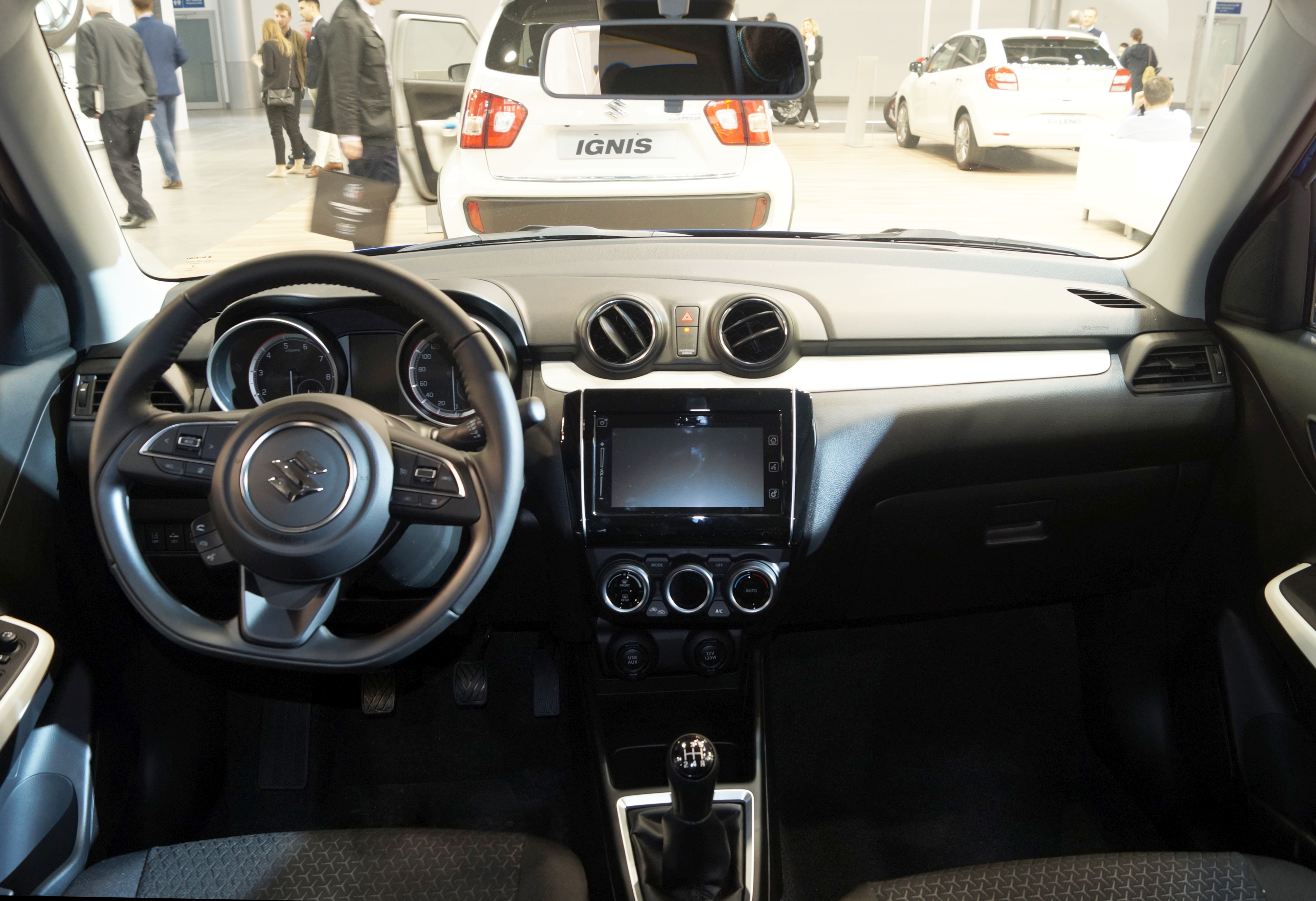 Wnętrze Suzuki Swifta na Motor Show Poznań 2017.